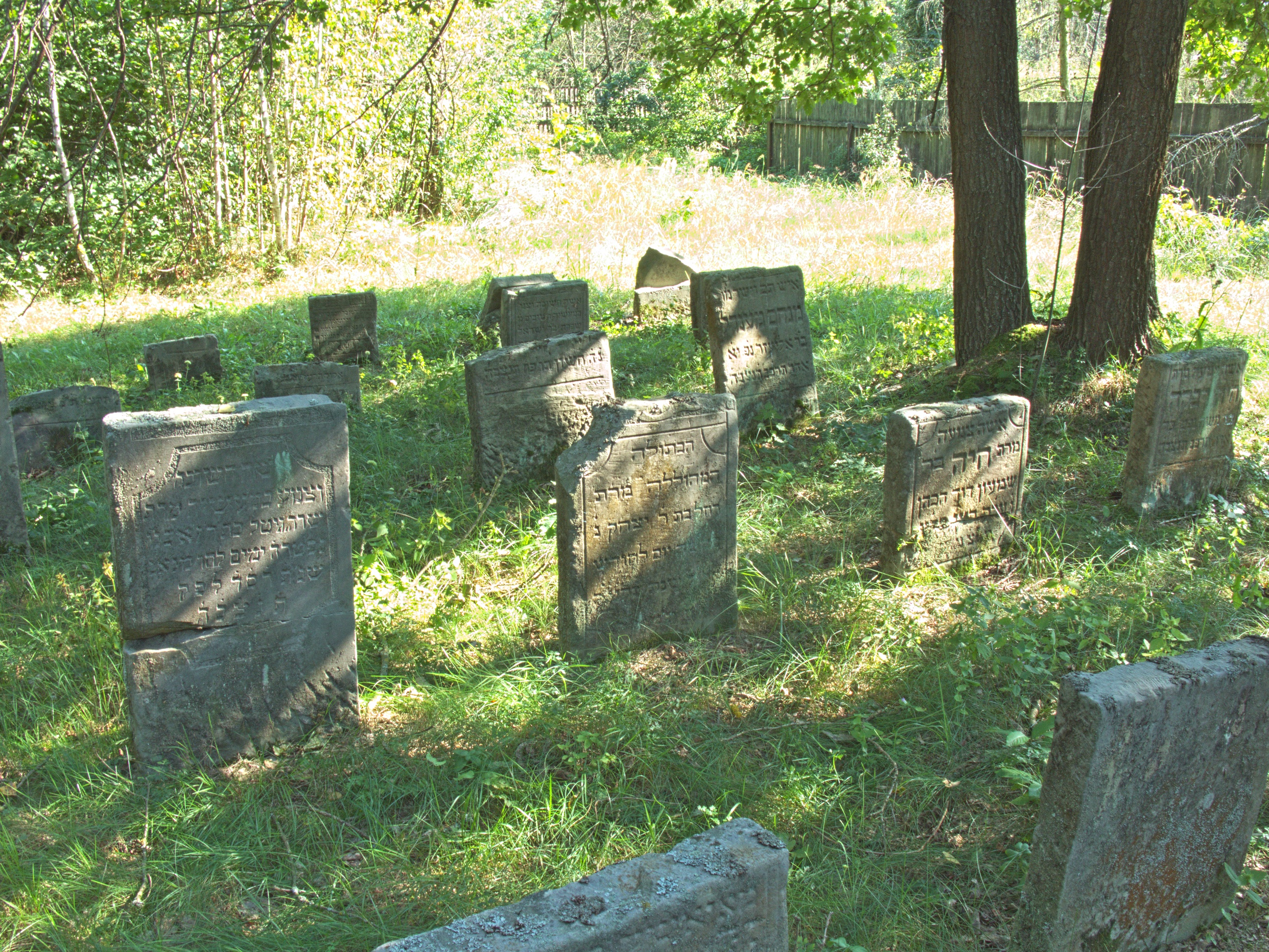 Cmentarz żydowski w Brańsku.